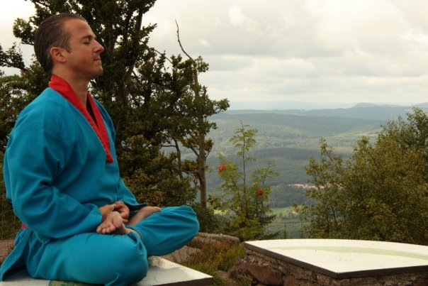 Méditation dans les Vosges